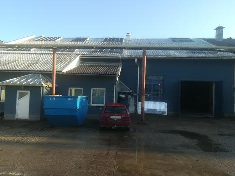 Hala, v kateri se nahaja proizvodnja Podjetja